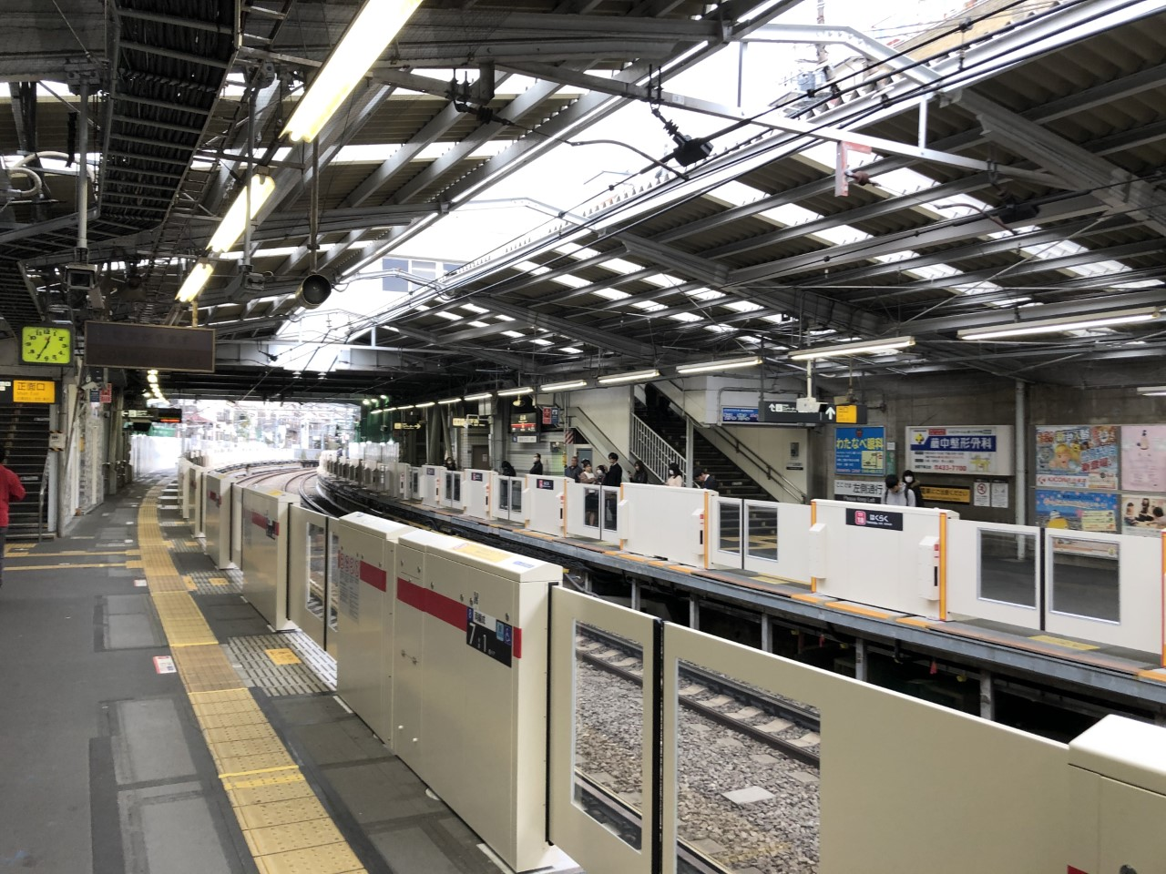 2020年の白楽駅ホーム画像